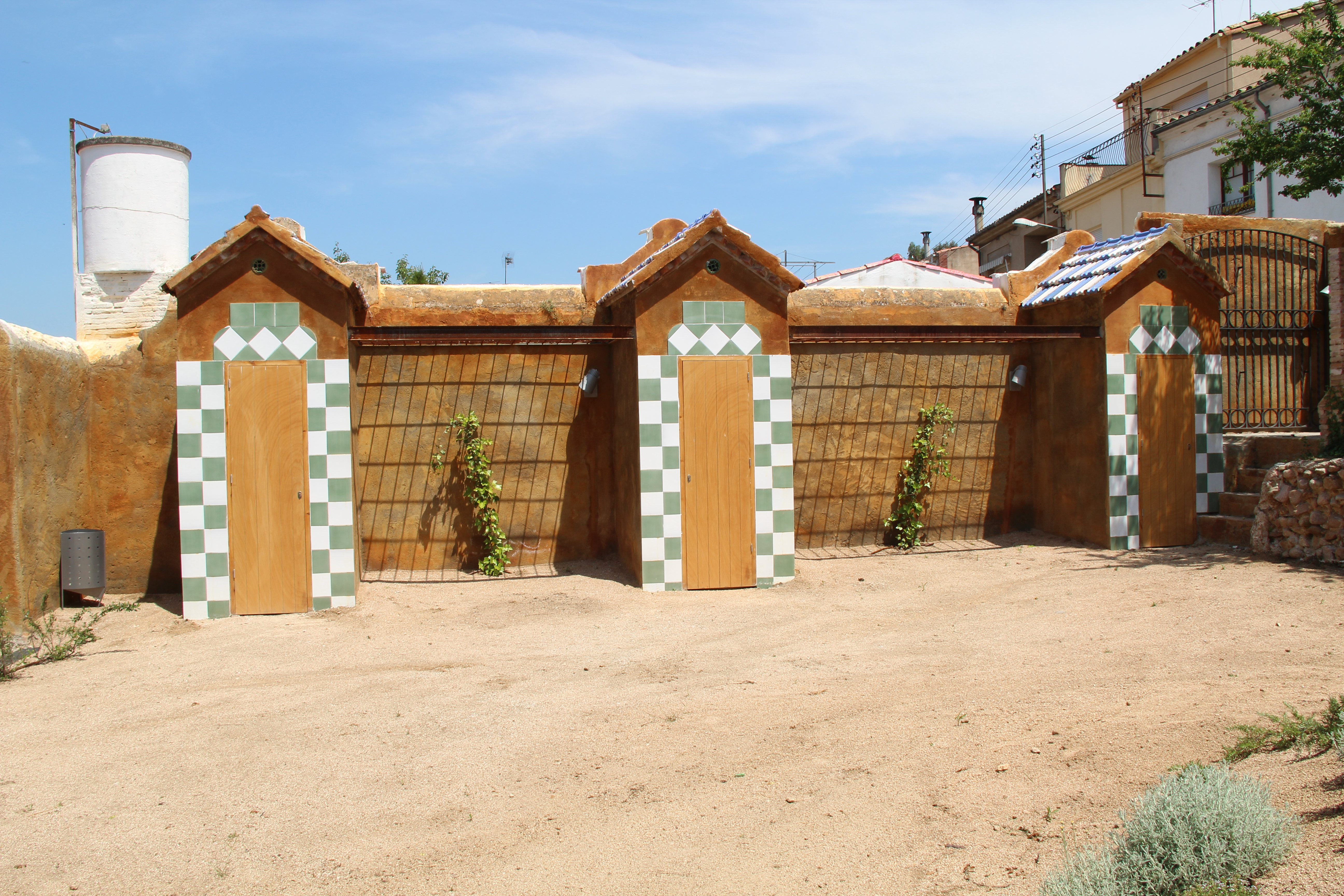 Santa Coloma de Farners En el jardí de la casa de la Paraula, sorprenen aquests antics colomars